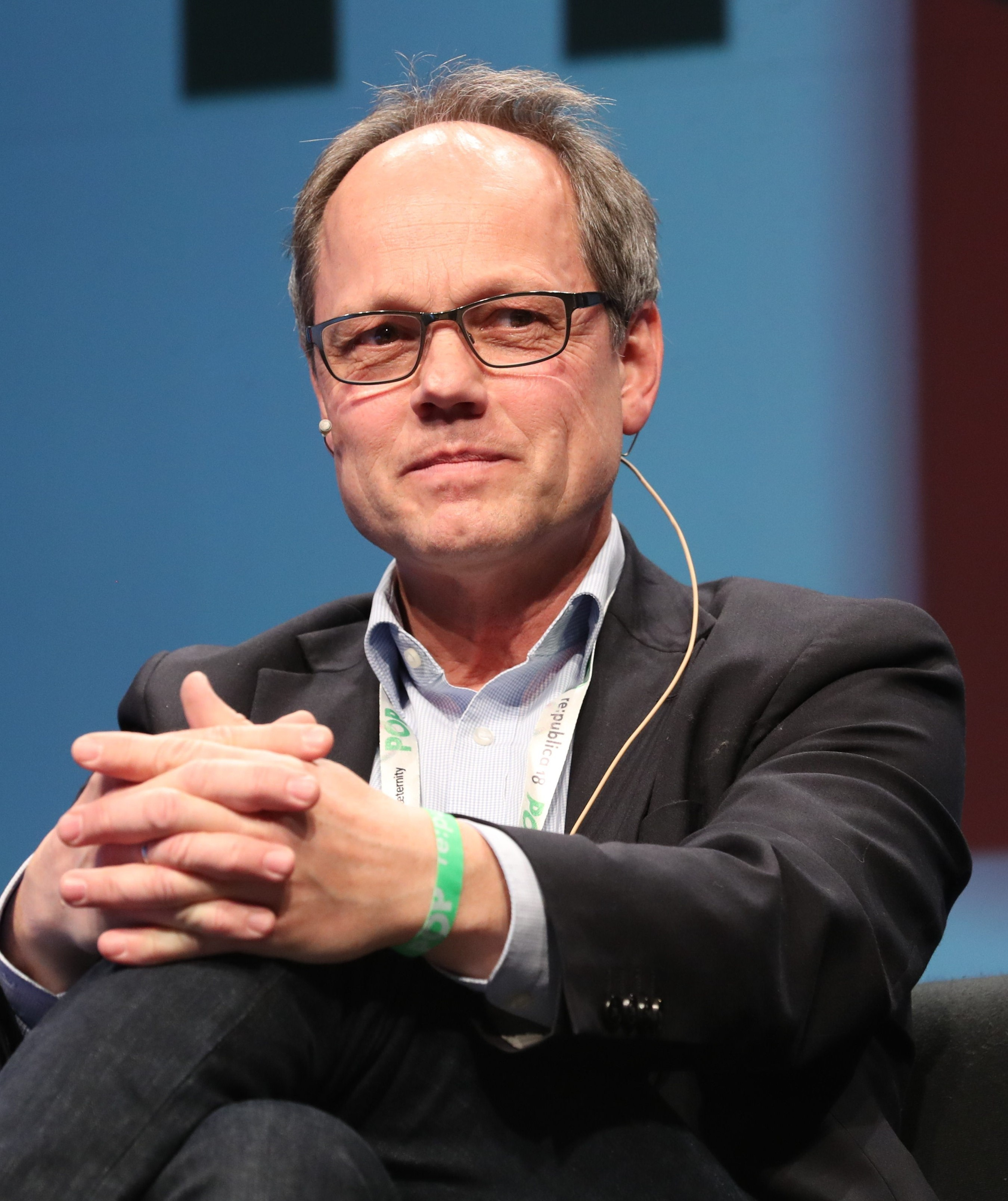 re:publica 18: Kai Gniffke (Chefredakteur, ARD-aktuell)